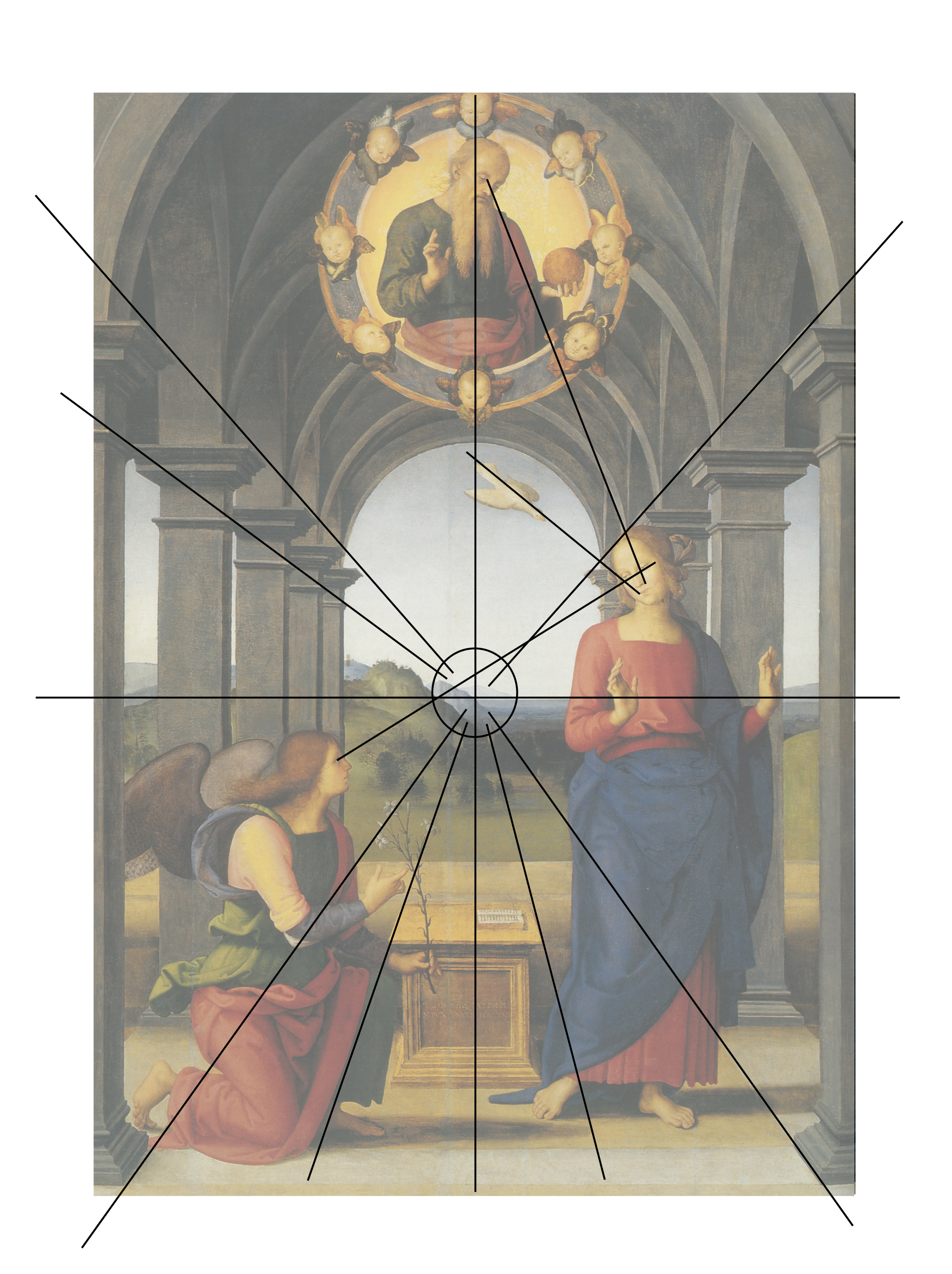 Affichage des lignes de force dans le tableau du Pérugin (Annonciation de Fano)